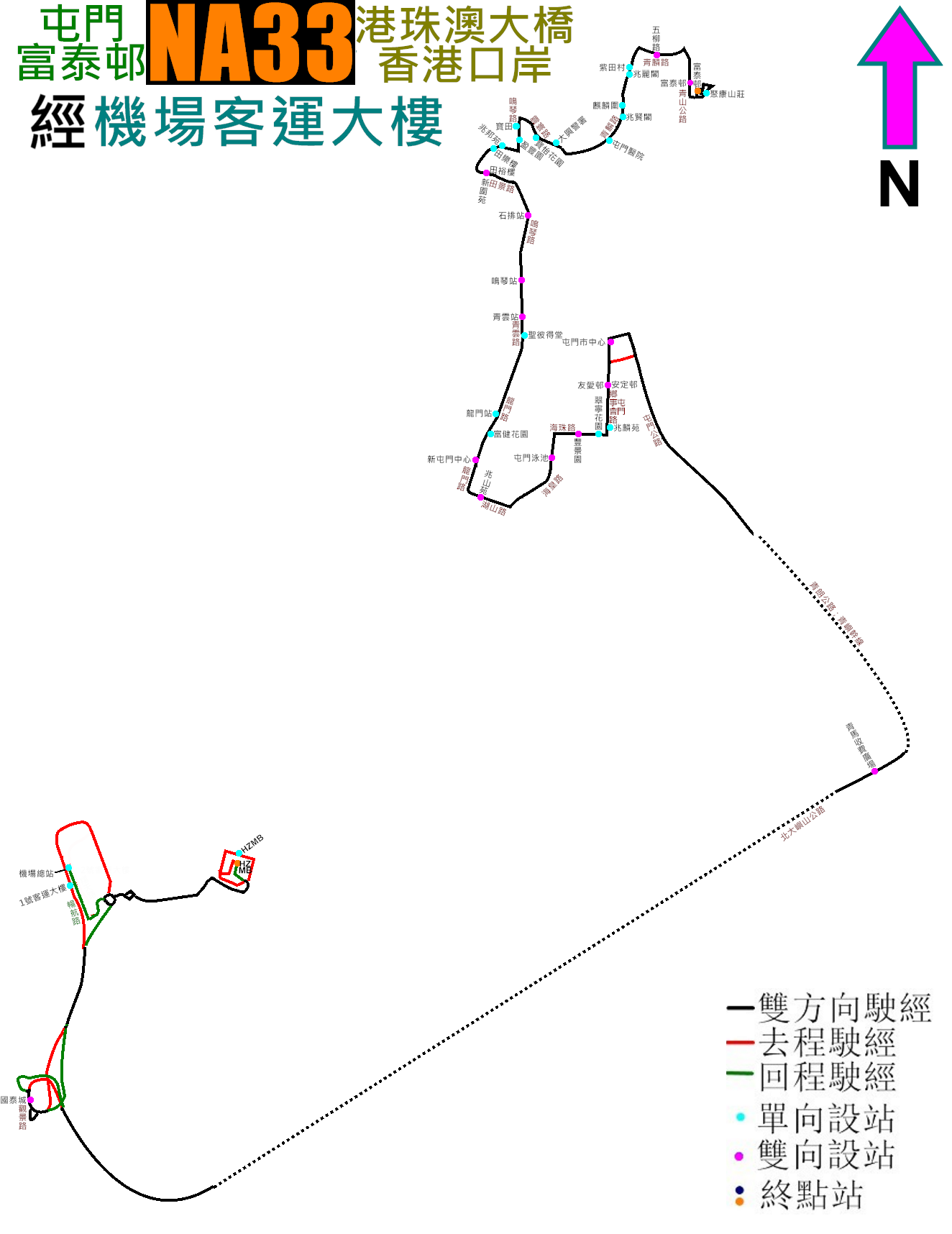 中文（香港）: 龍運巴士NA33線的走線圖